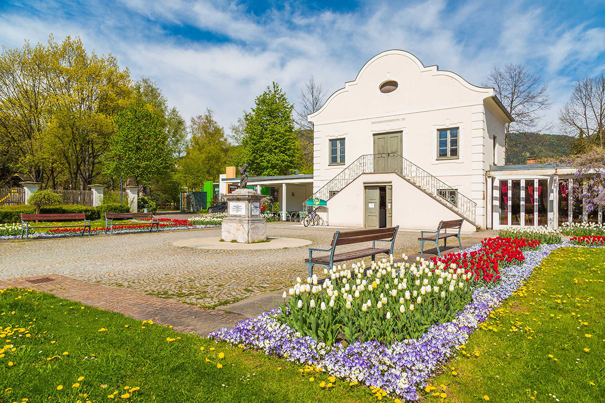 Der Vorfrieden von Leoben wurde im Eggenwald'schen Gartenhaus unterzeichnet. Dasu Bauwerk steht am Glacis.